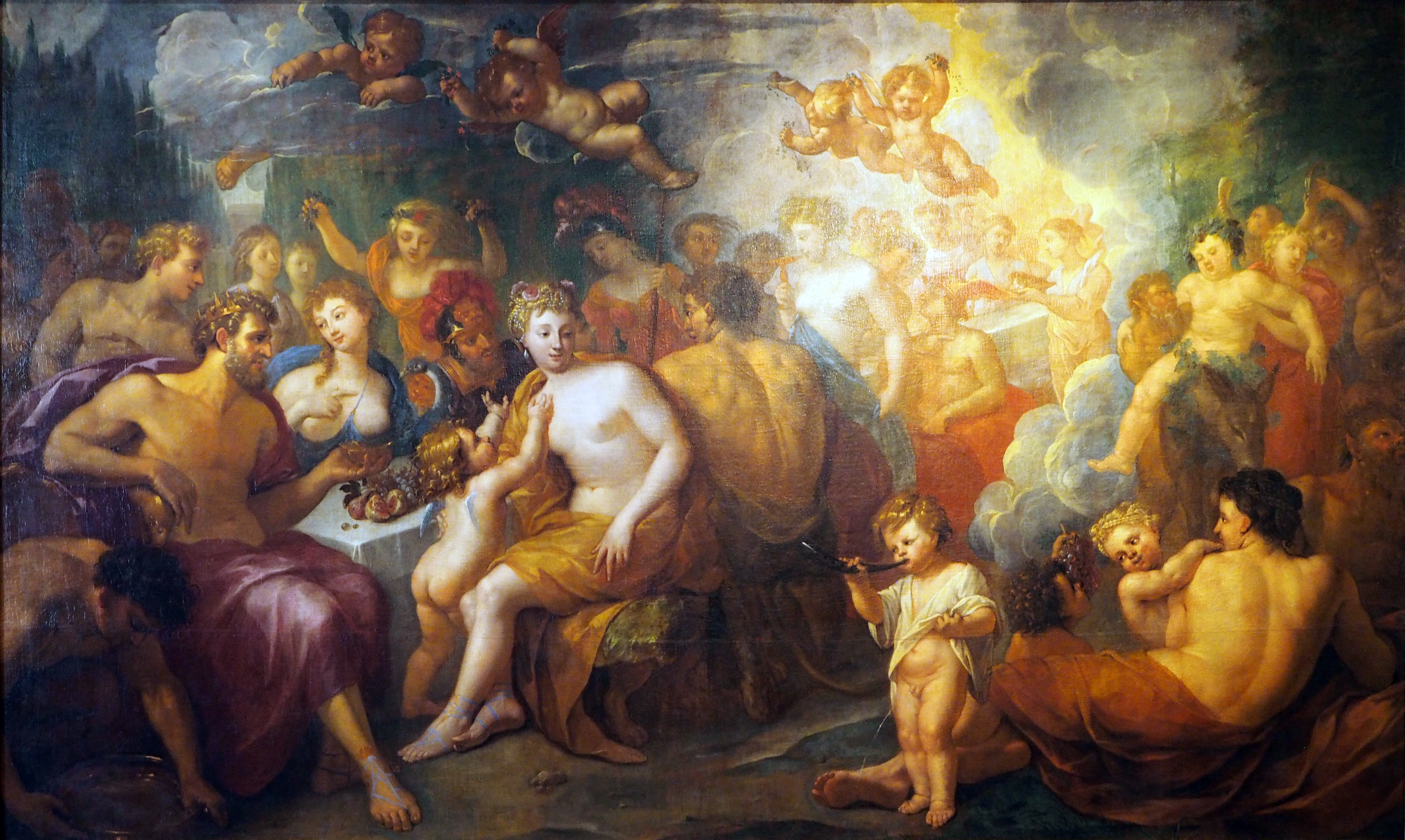 Das Bild stammt möglicherweise aus der Innenausstattung von Schloss Schwedt